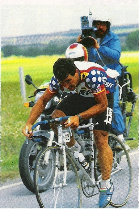 Cilclista Español